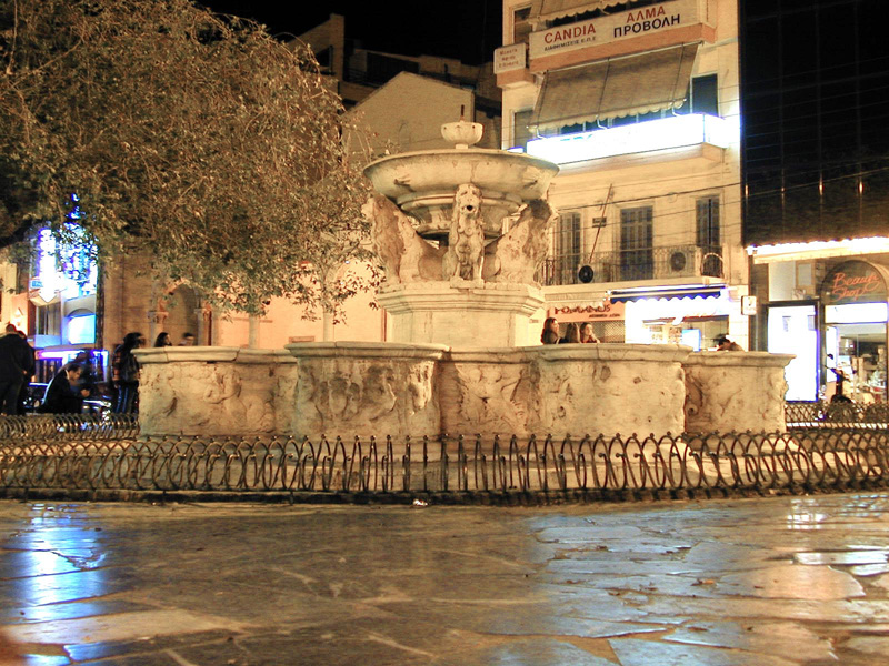 La fontaine Morosini date de 1628 La ville d'Héraklion est à l'emplacement du port antique de Cnossos. Les Arabes qui ont pris la Crète en 824 fortifièrent la ville. Le nom arabe du fossé autour des remparts (Khandak) est devenu Candia pour les latins. Les vénétiens (1204-1669) construisirent de nouveaux remparts pourvus de bastions toujours visibles.